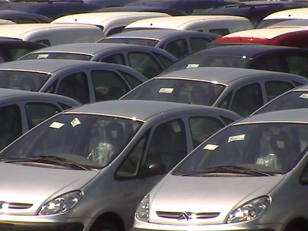 Coches en Zona Franca de Vigo.